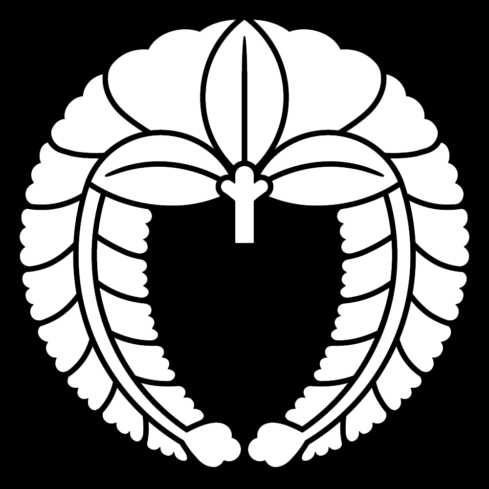 家紋・藤の一種、「下がり藤」。藤原氏族が発祥の由緒正しい家紋。